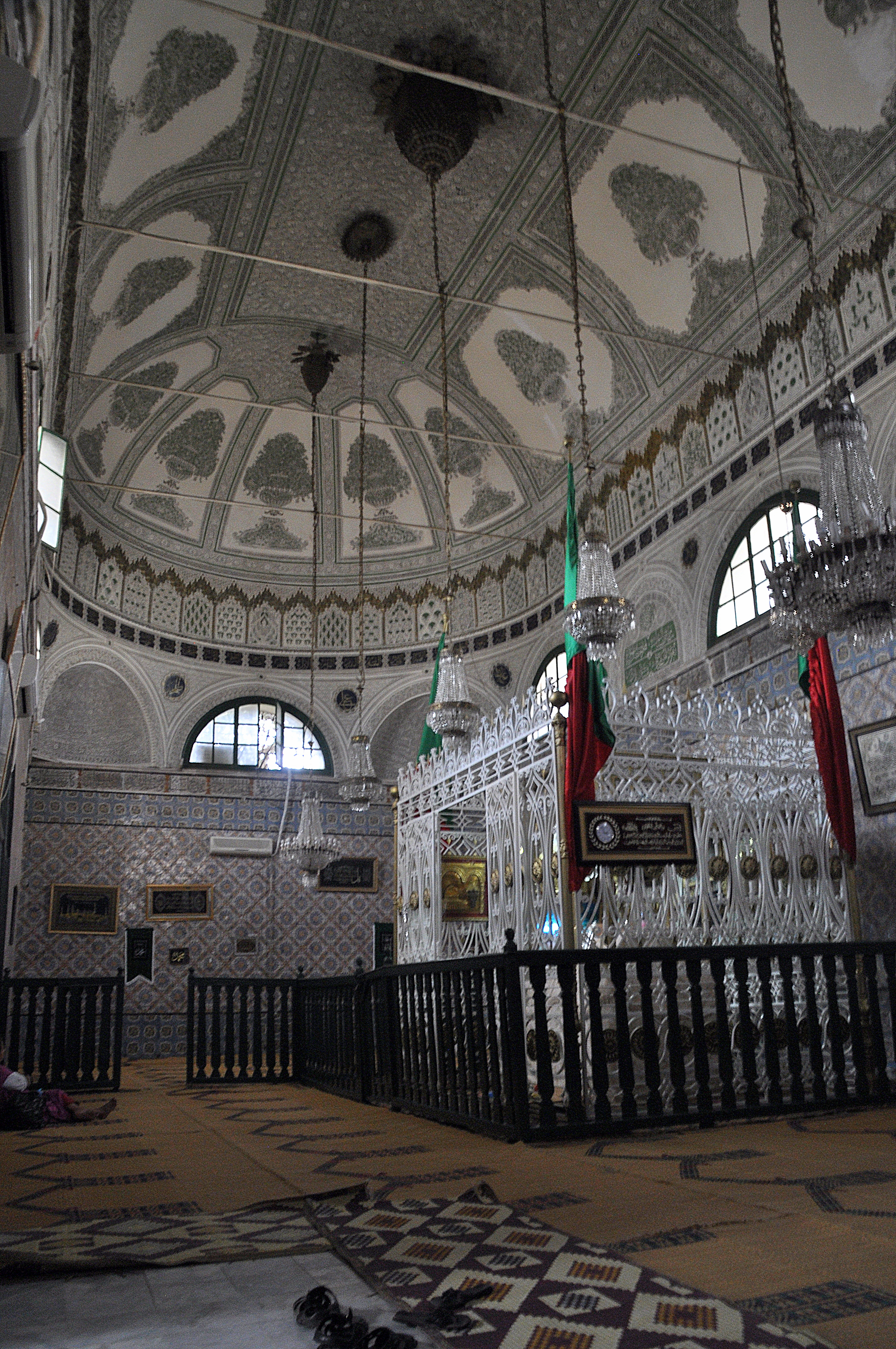 Zaoui Sidi Mahrez, Tunis